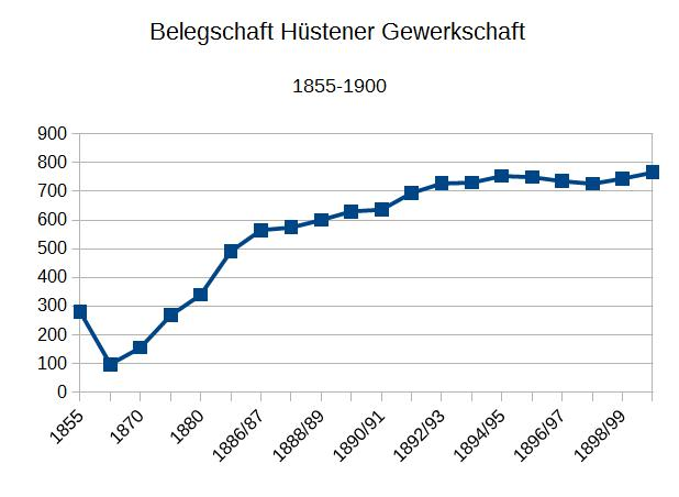 Quellen WWA F65 435, 455, 739, 838, Thyssen-Krupp VSt 27, Theodor Thüsing: Die wirtschaftliche Entwicklung des Kreises Arnsberg. Diss Münster, 1921 S.114, Jens Hahnwald: Die Hüstener Gewerkschaft. Werk, Belegschaft und Gemeinde 1839-1926. In: Hüsten 1200 Jahre. Arnsberg, 2002 S.239